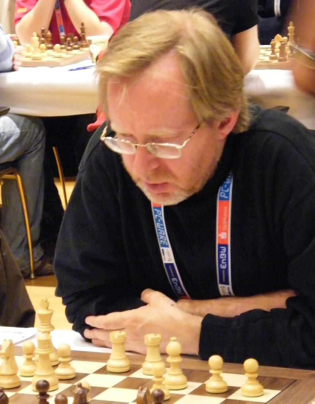 Murray Chandler bei der 38. Schacholympiade in Dresden 2008